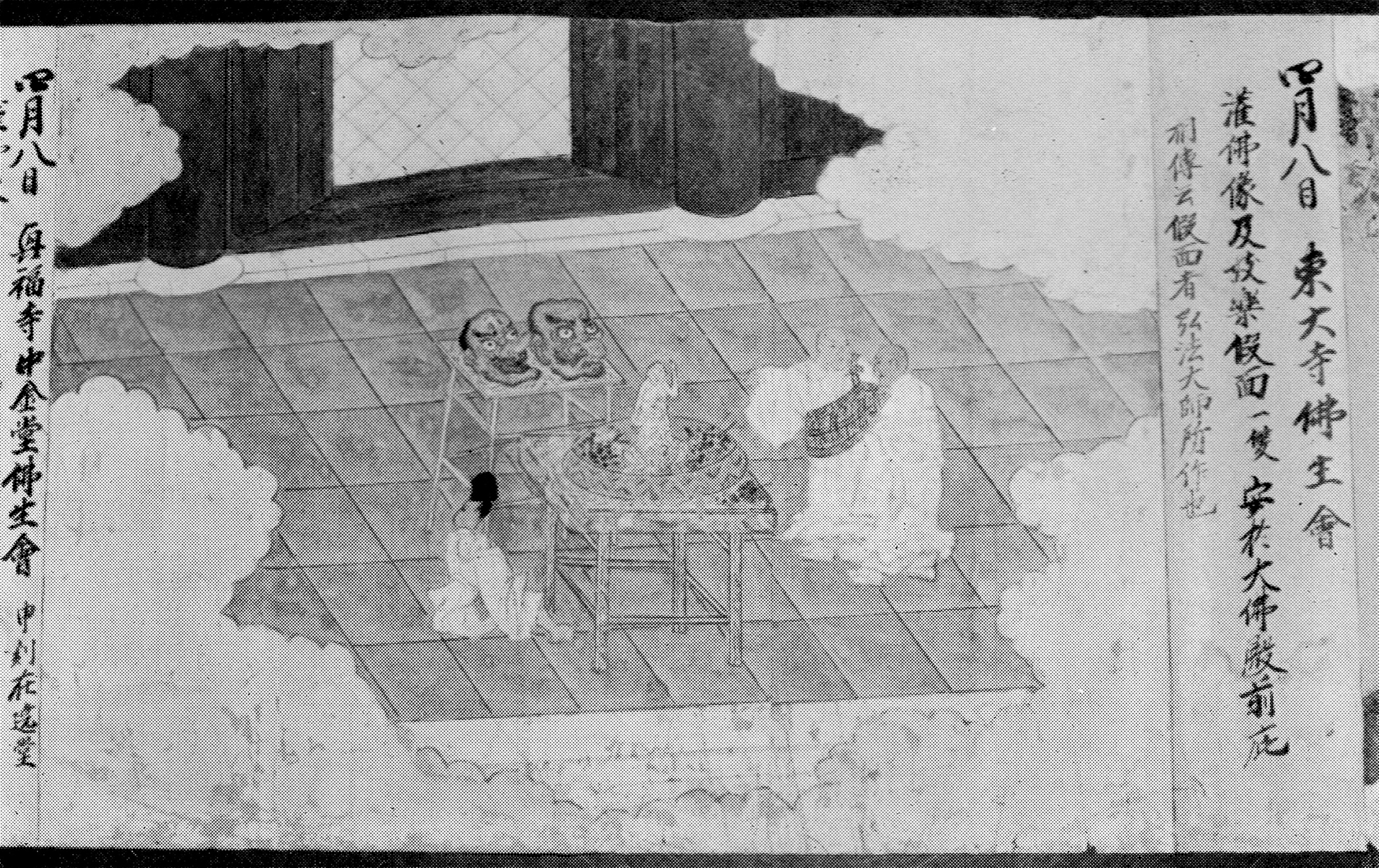 諾楽年中行事絵巻 村井古道自筆 東大寺佛生會